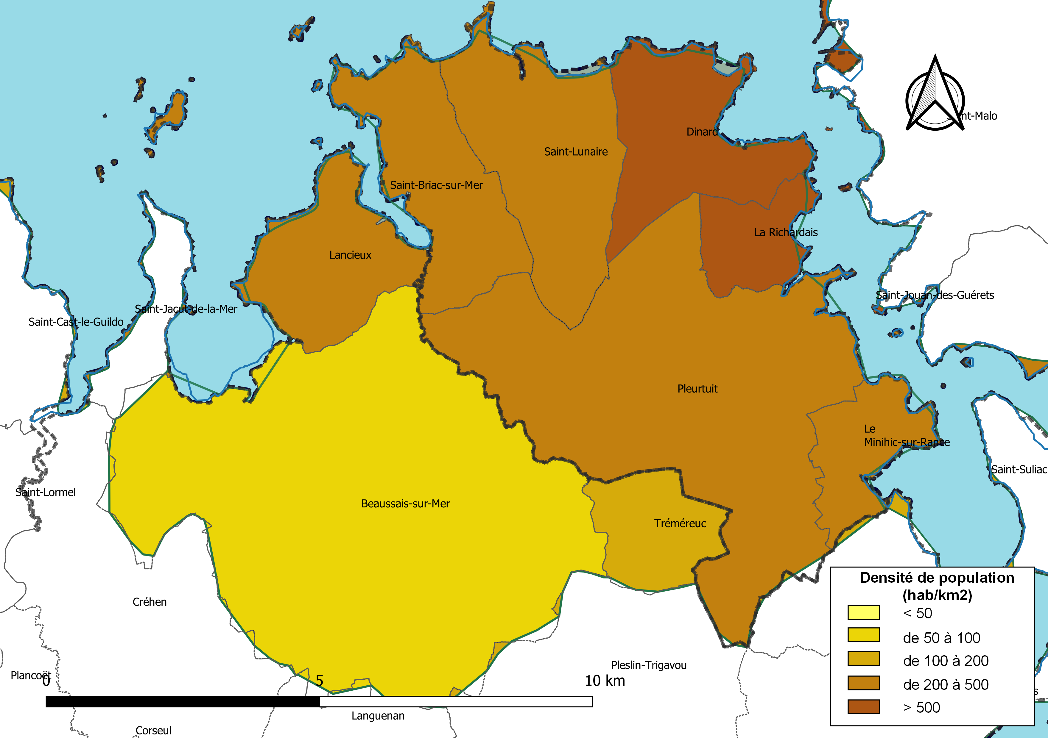 Carte des densités de population (millésimée 2016) des communes de la Communauté de communes Côte d'Émeraude, département d'Ille-et-Vilaine, France. Composition au 1er janvier 2019.